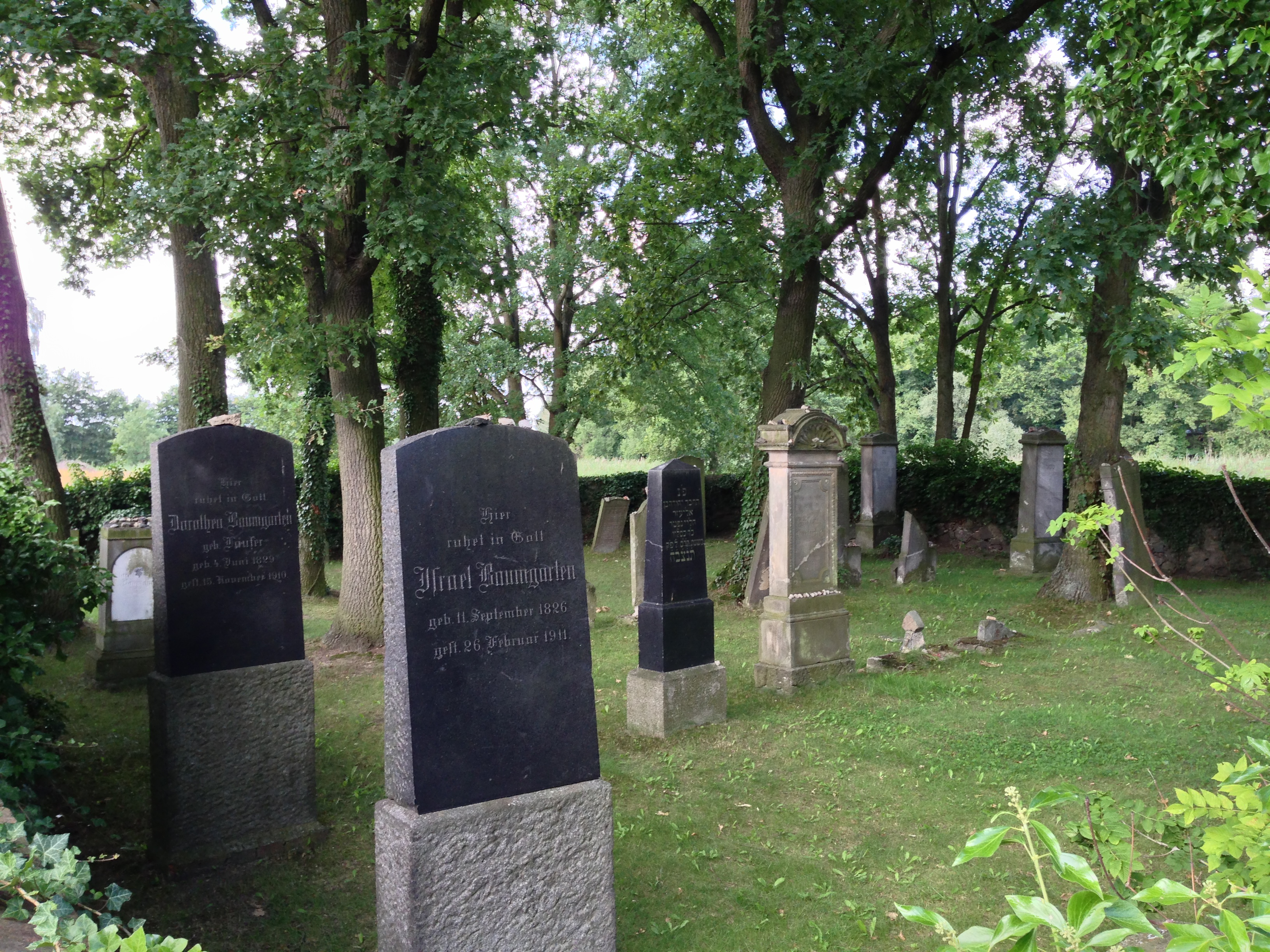 Jüdischer Friedhof in Groß Neuendorf (Letschin, Brandenburg), Ansicht